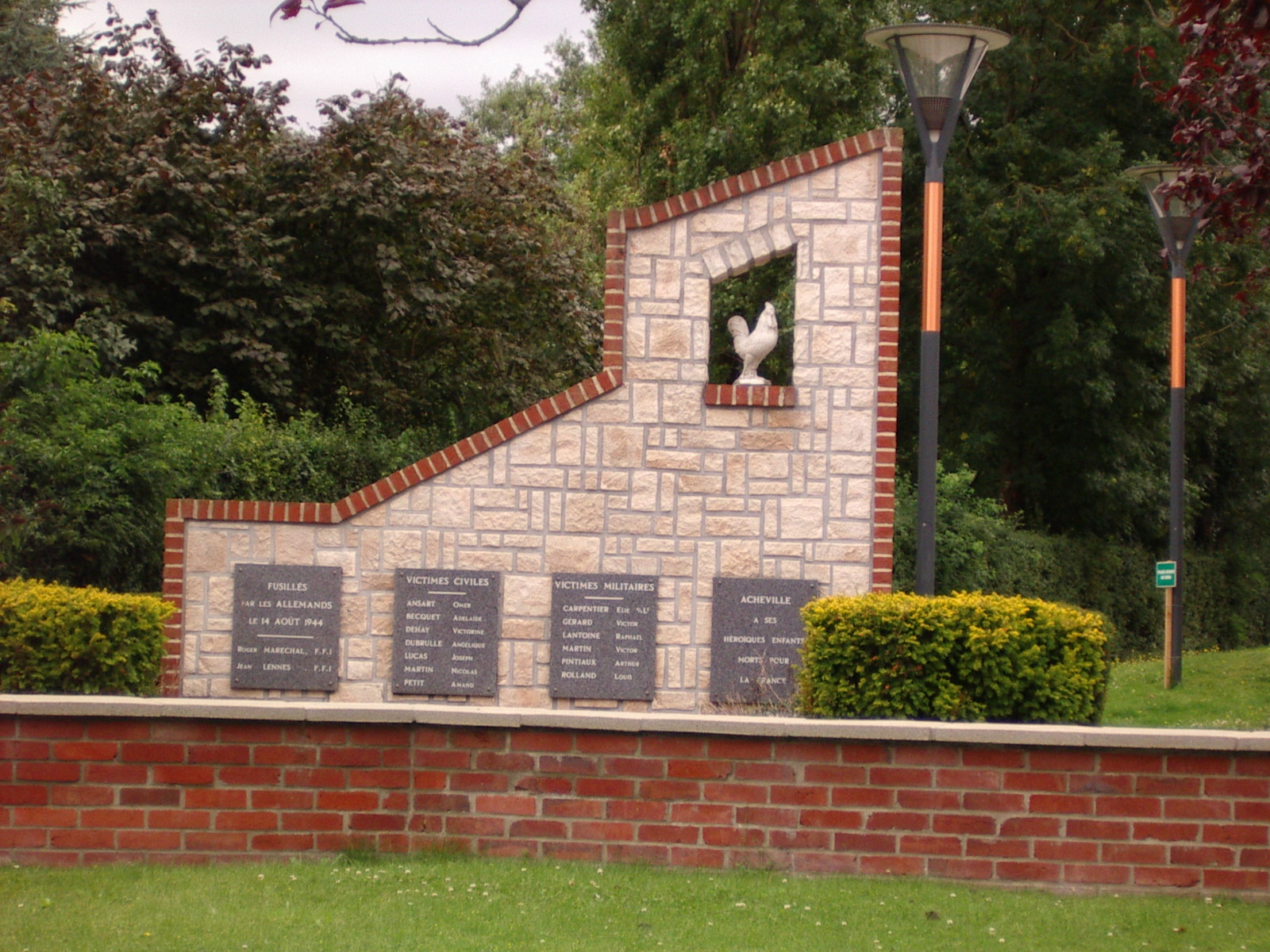 Monument aux morts Acheville